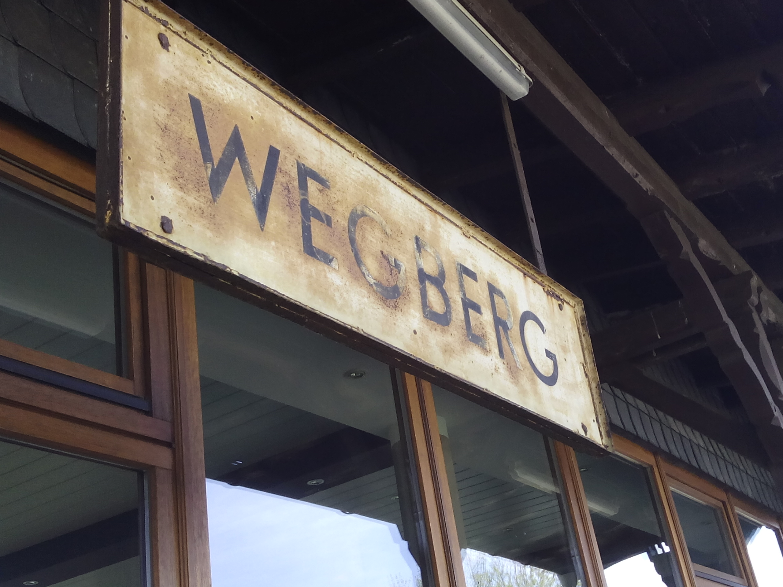 Am Wegberger Bahnhof hängendes Haltestellenschild